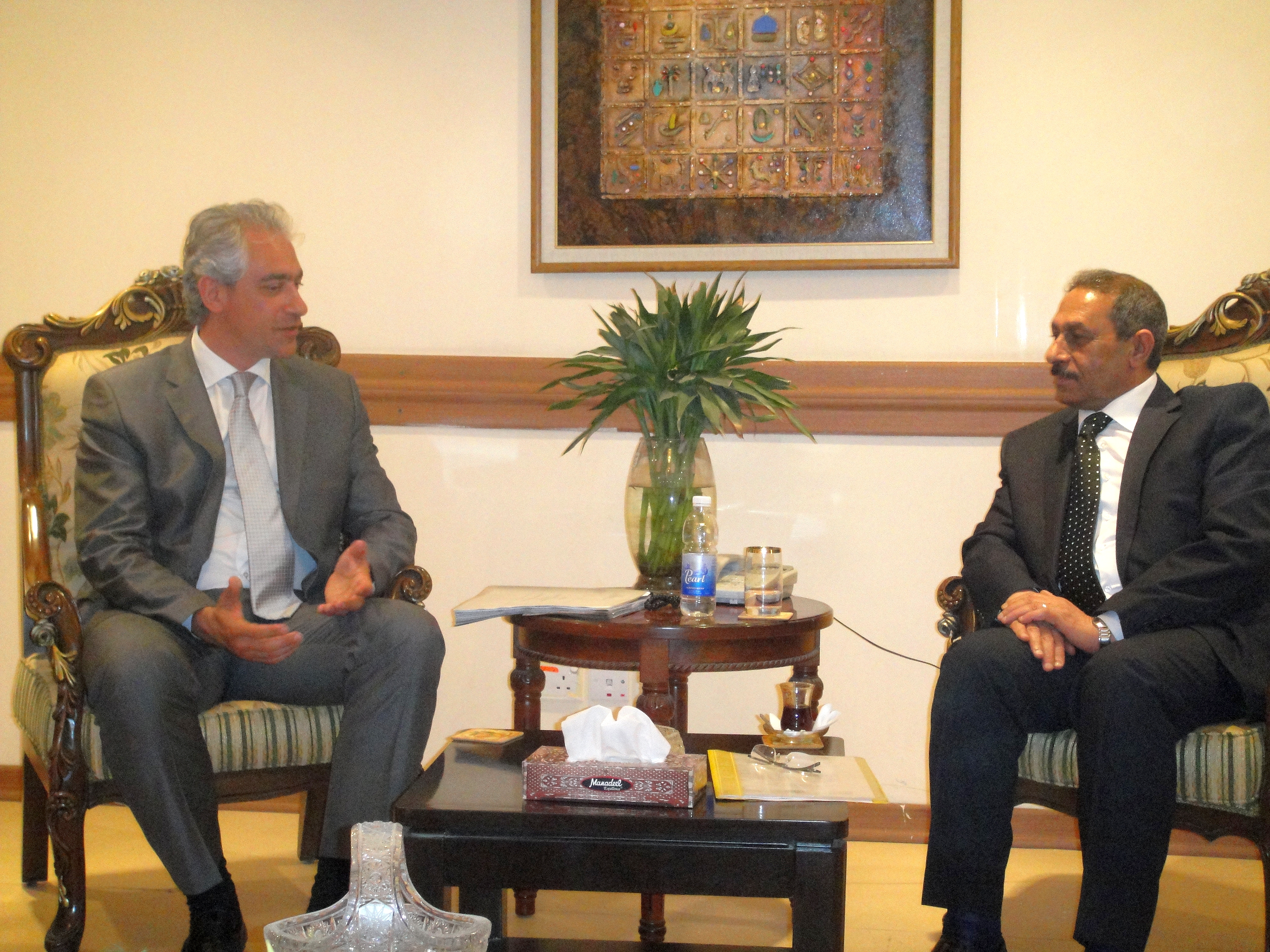 Τη Δευτέρα 6 Ιουνίου, ο Υφυπουργός Εξωτερικών Σπύρος Κουβέλης μετέβη στο Ιράκ όπου πραγματοποίησε διμερείς επαφές με μέλη της ιρακινής κυβέρνησης. Συνάντηση με Ιρακινό Υφυπουργό Γεωργίας, Μehdi Al Qaisi. On Monday, 6 June, Deputy Foreign Minister Spyros Kouvelis travelled to Baghdad for bilateral meetings with members of the Iraqi government. Meeting with Iraqi Deputy Agriculture Minister, Mehdi Al Qaisi.